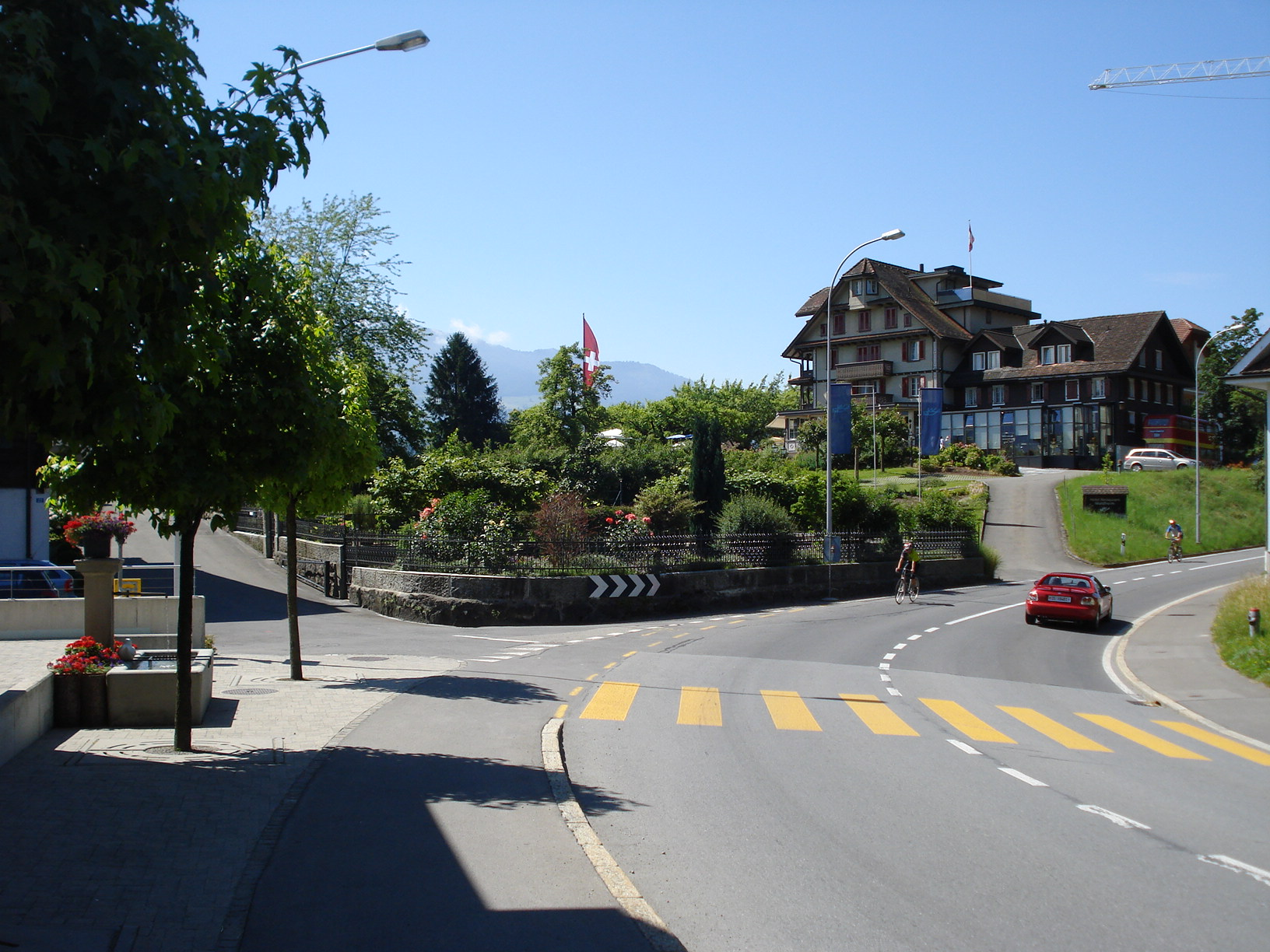 Risch